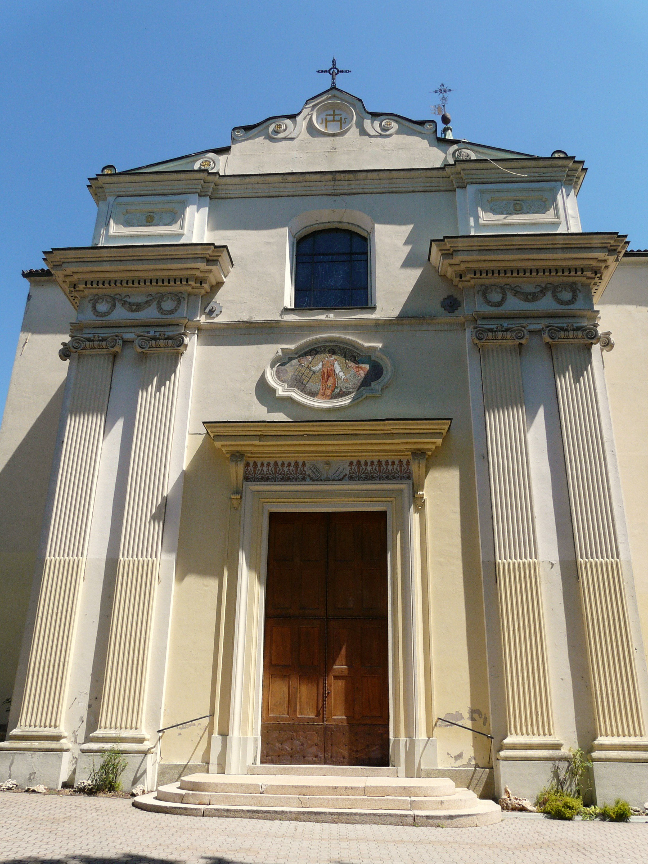 Facciata della chiesa di San Lorenzo martire, Vignole Borbera, Piemonte, Italia